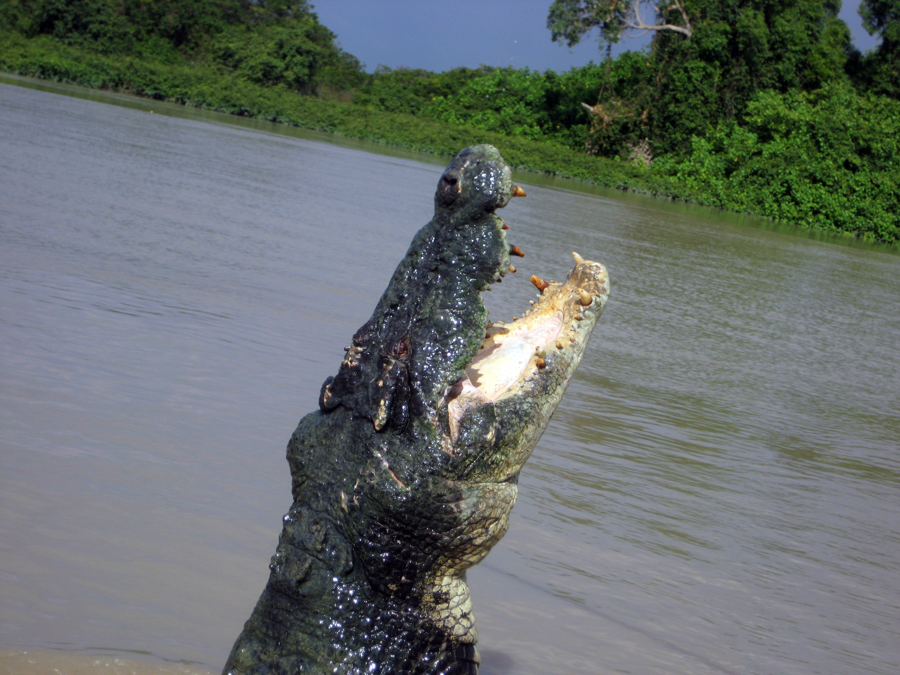 Adelaide River, NT.